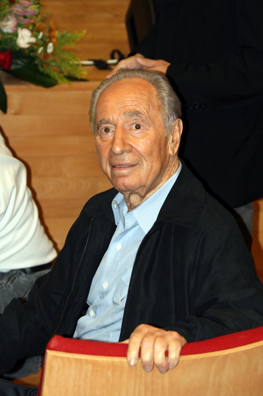 Shimon Peres président d'Israel à Tel Hai